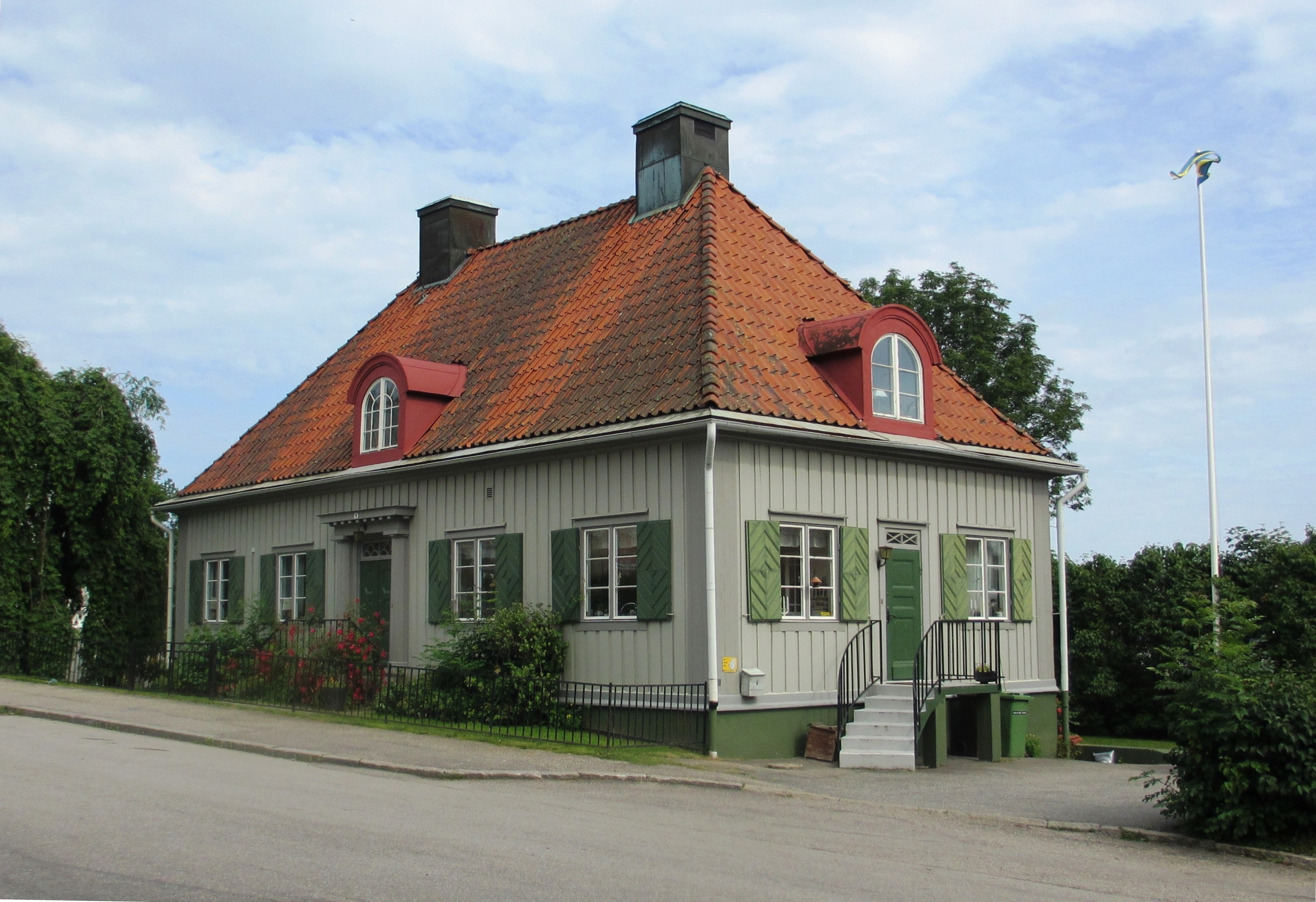 Pilen 14, villa, Norrtullsgatan, Söderhamn